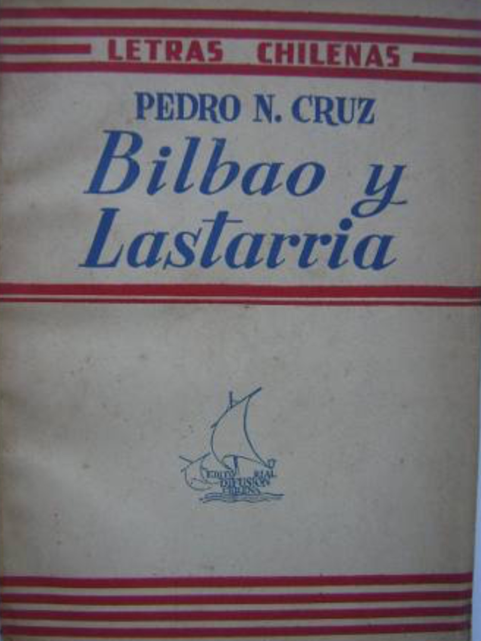 Publicación póstuma de Pedro Nolasco Cruz Vergara. Crítica Literaria sobre Francisco Bilbao y José Victorino Lastarria, publicado en el año de 1944. Santiago de Chile.